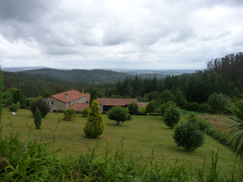 FOTO